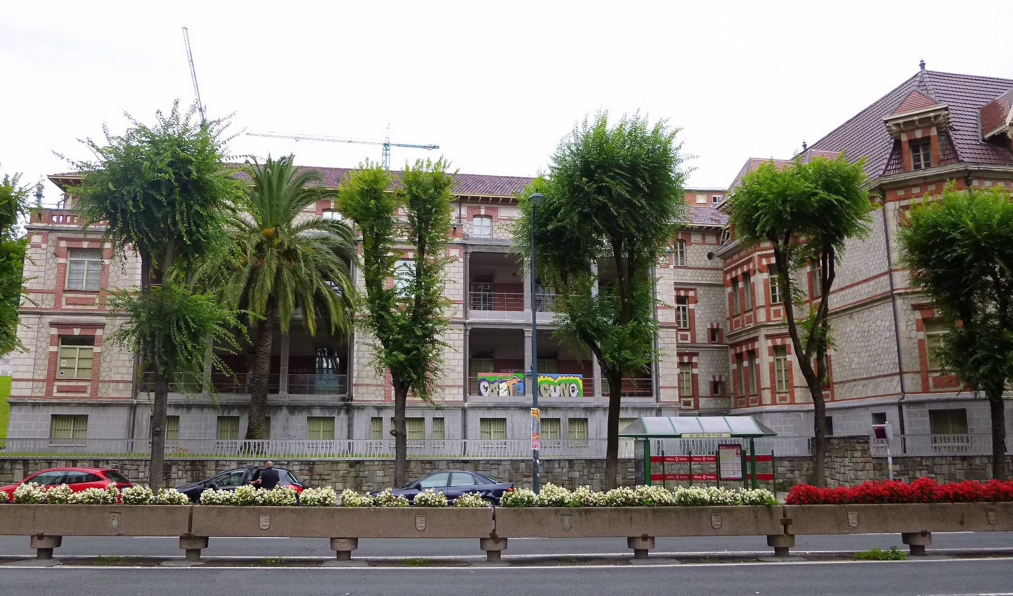 Centro de Salud Bidarte (Bilbao)